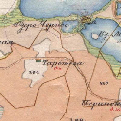 Деревня Тарбеева на карте 1850 года